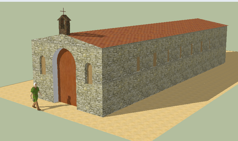 ermita de San Miguel de afuera - Tudela de Navarra - España ( reconstrucción )